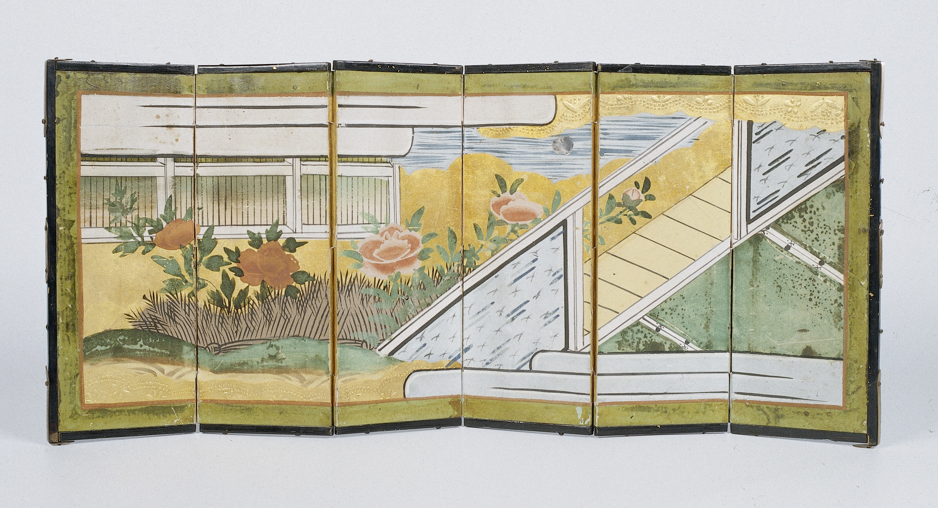 kamerscherm met zes panelen, vervaardigd van hout, aan beide zijden beplakt met papier, met papieren scharnieren (twee hele en twee halve). Het geheel omrand met latten van zwart gelakt hout, verstevigd met verguld koperen beslag. De voorzijde is binnen een geelgroene omlijsting beschilderd met een voorstelling van een Japans interieur met tatami-matten en een open wand, een tuin met hekerk, pioenrozen en gras, wolken en een maan, uitgevoerd in gouache en bladgoud over dikkere 'klodders' verf, met penseel aangebracht. De achterzijde is beplakt met grijs Japans papier, naderhand (dus nadat het papier al op het scherm geplakt is) met een stencil of sjabloon in zwart beschilderd met geometrische motieven in cirkels. De breedte van het sjabloon is circa twintig centimeter. Label Line: anoniem, 1676 - 1699, gouache